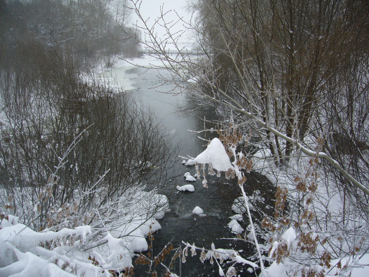 Речка Ольховка